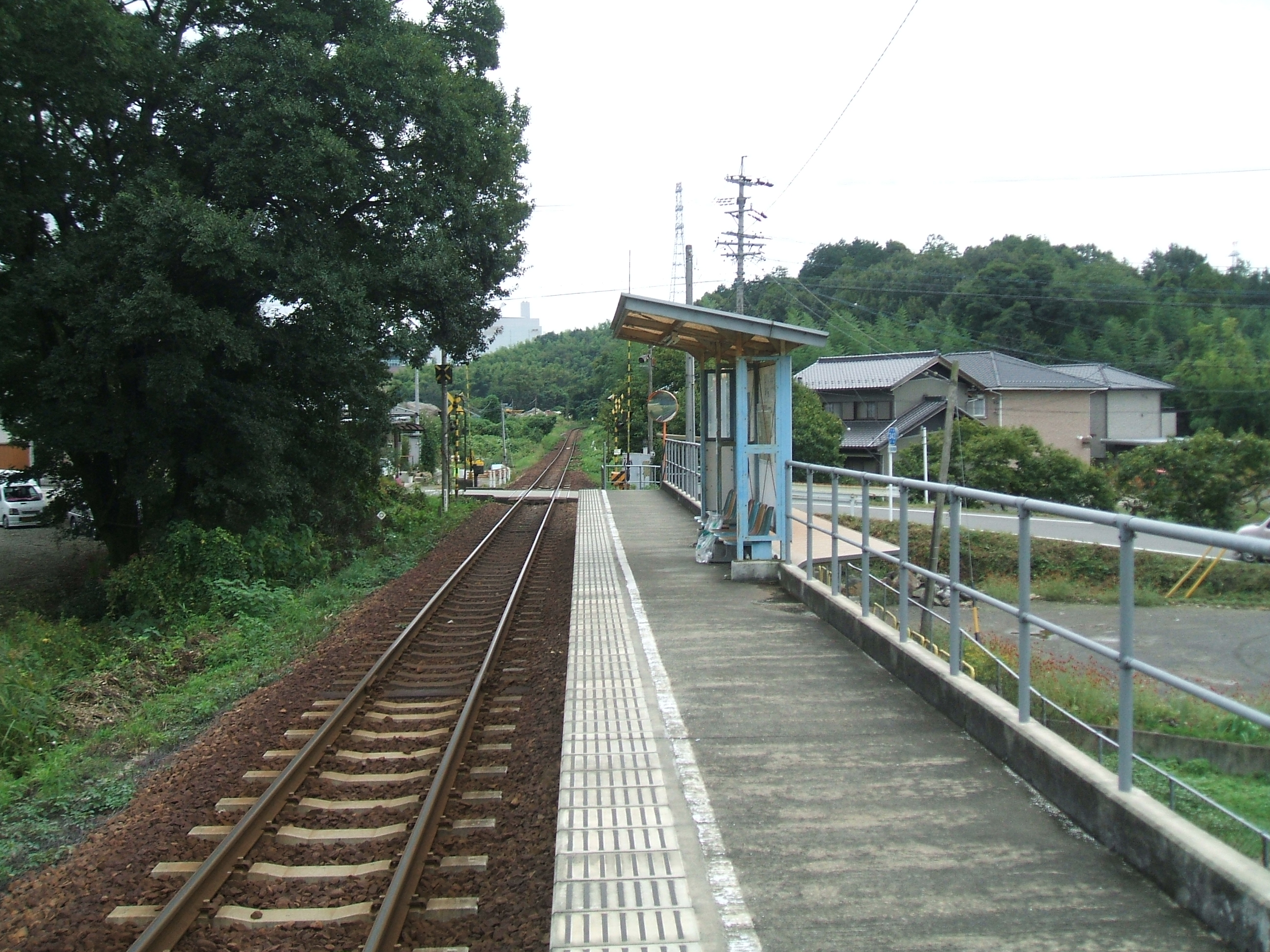 駅ホームより出入り口、関方面を見る。